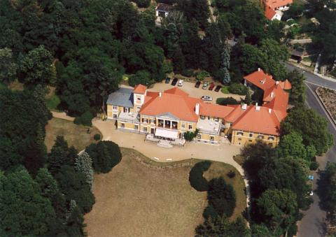 Alkotóház, volt Esterházy-kastély, klasszicista, 19. sz. eleje. Jelentős 20. sz.-i bővítésekkel. Parkja védett. - Szigliget, Kossuth u. (174.) 188.? 17